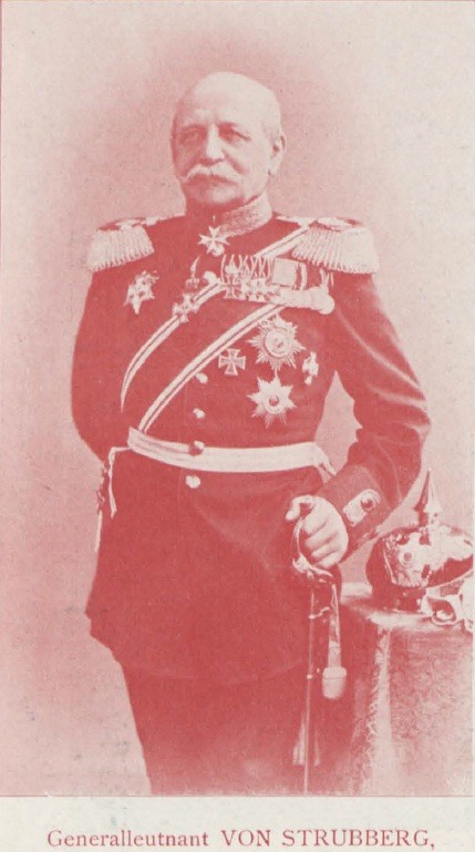 Otto von Strubberg (1821-1908), ein preußischer General der Infanterie. Aufnahme von 1899 (oder früher).